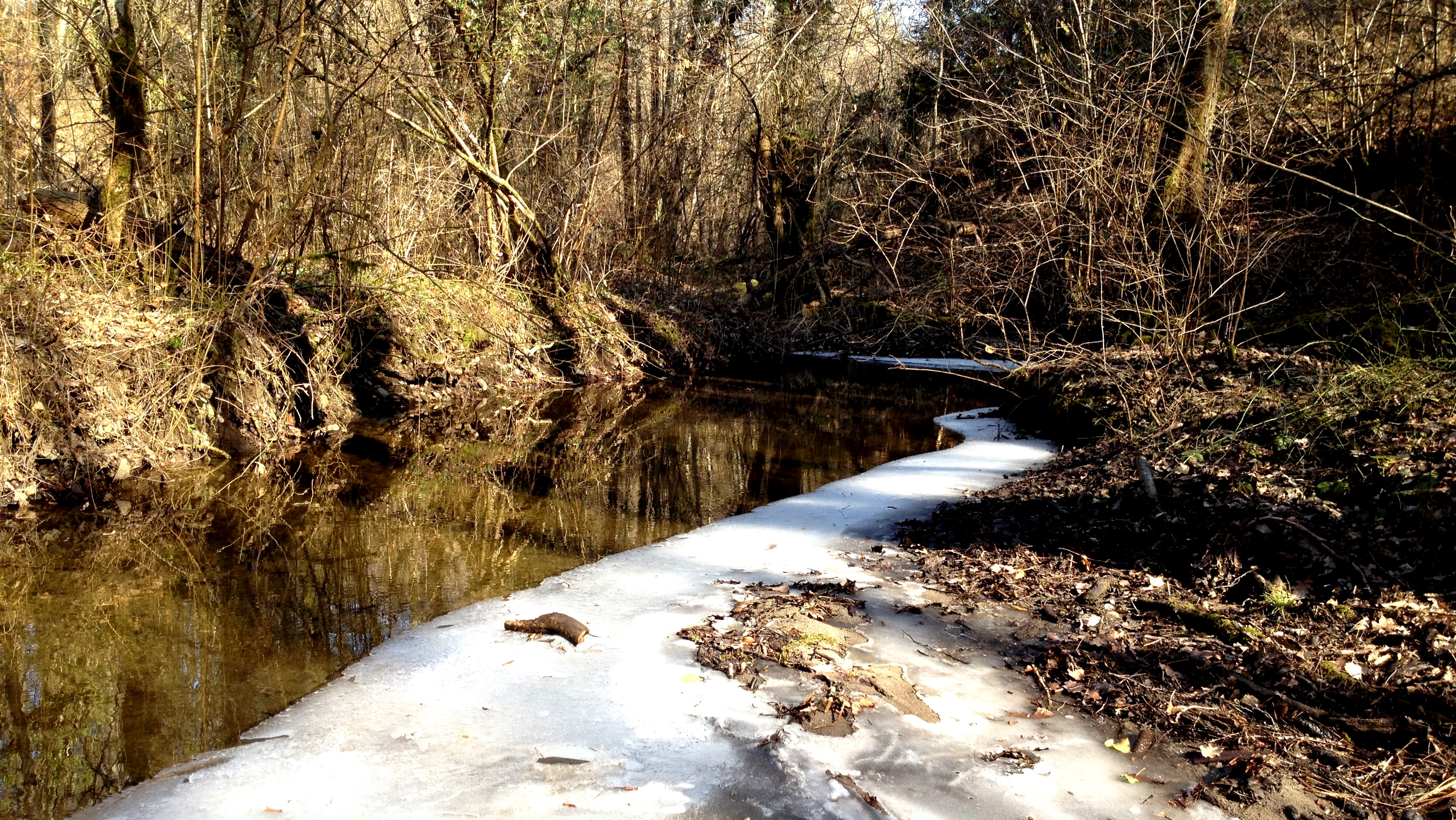 Le Marnot, confluent de l'Hermance; ici situé entre les communes de Chens-sur-Léman et Veigy-Foncenex entre les lieudits Les Bourgues et La Tuilière, à proximité d'Hermance (Suisse)